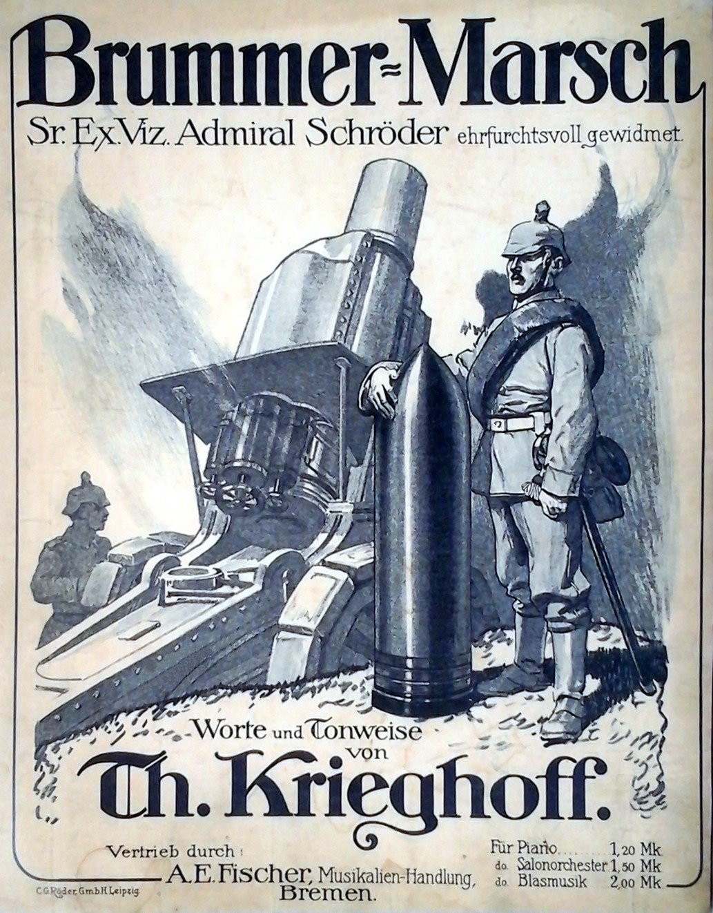 Brummer-Marsch von Th. Krieghoff um 1919